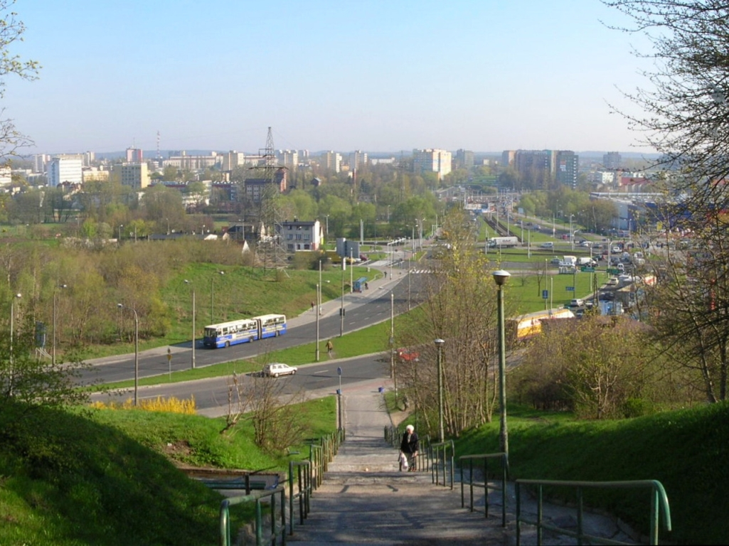 Widok ze Zbocza Bydgoskiego na Wyżynach w kierunku ronda Toruńskiego